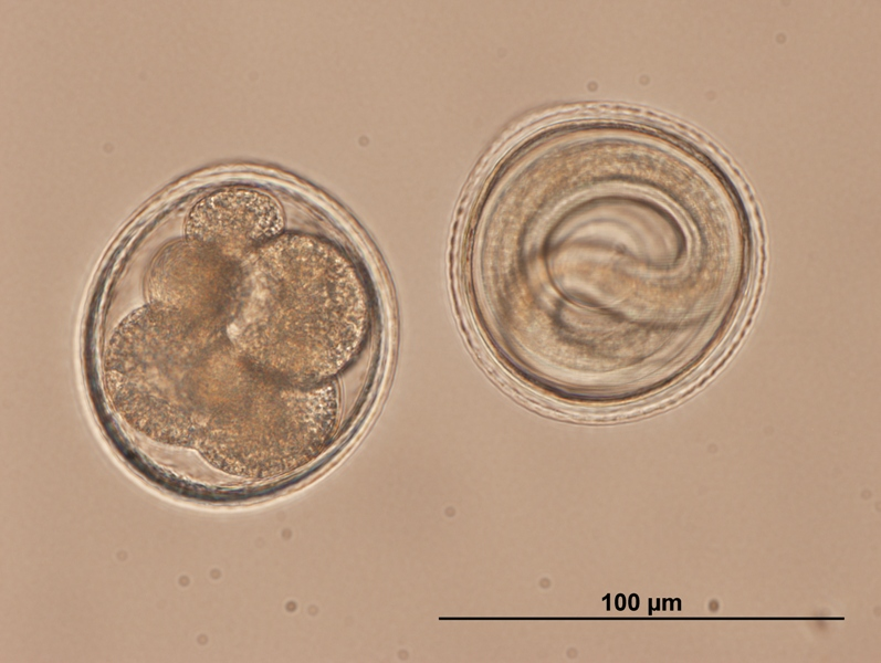 Toxocara canis embryonated eggs. Photo taken through a microscope at 400x. On the left side: T. canis egg containig morula, On the right side: T. canis egg containing fully developed infectious larva L3 Česky: Vyvinutá vajíčka T. canis. Foceno pod mikroskopem při zvětšení 400x. vlevo: vajíčko obsahující mourulu, vpravo: vajíčko obsahující plně vyvinutou larvu L3